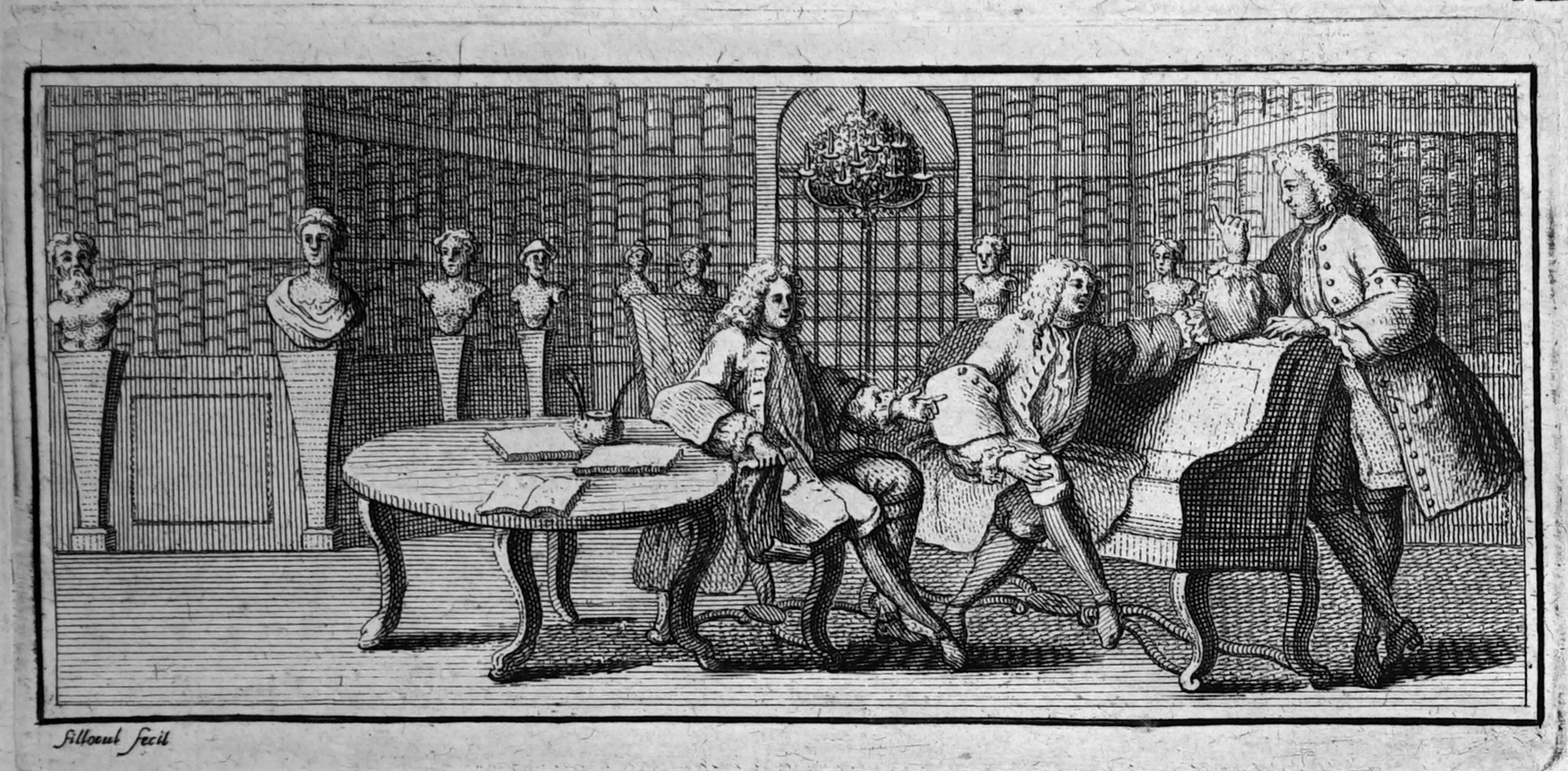 extrait du livre oeuvres de ...Marot avec une gravure de Filleoul.